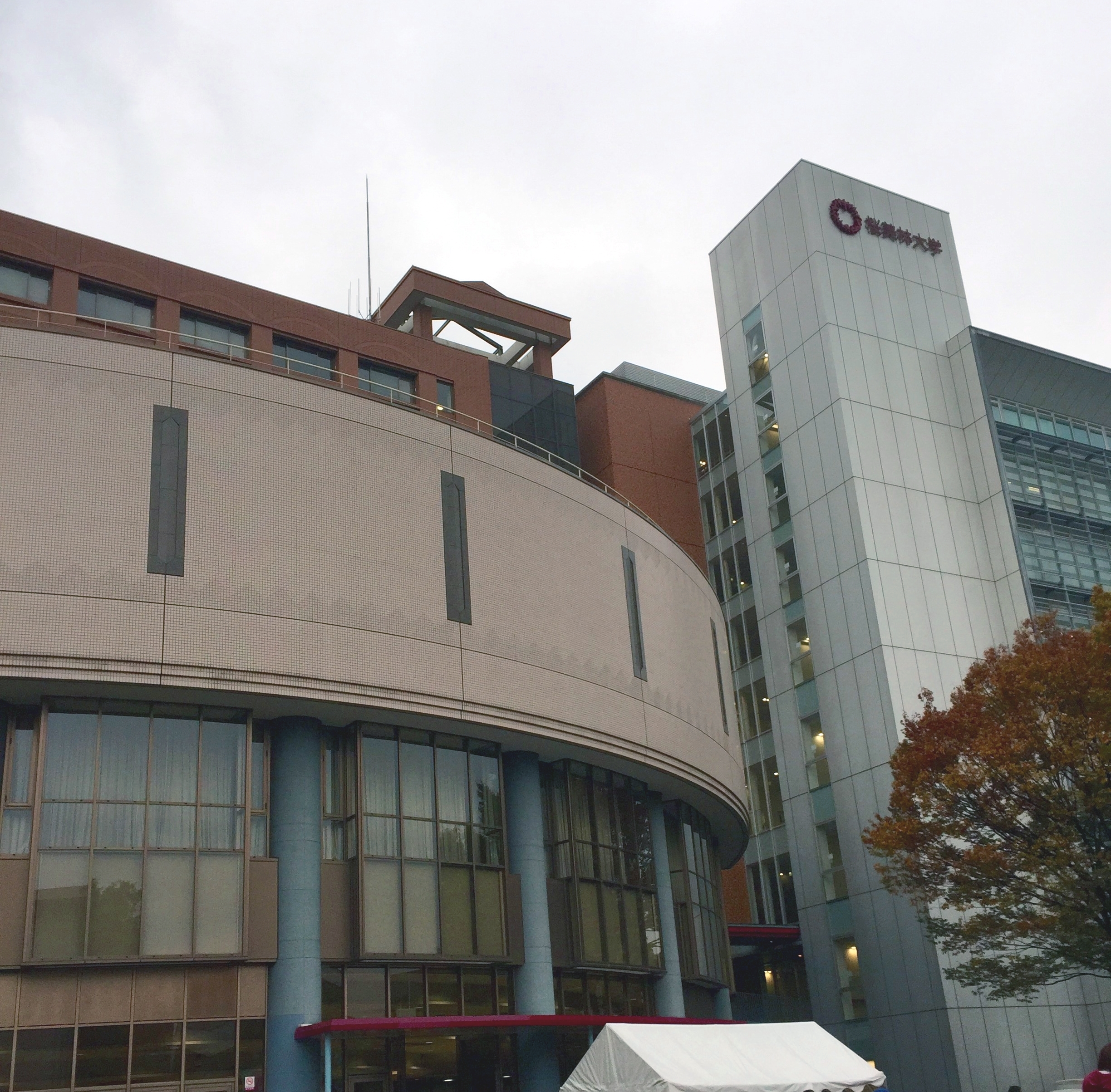 中文（中国大陆）: 樱美林大学町田校区主建筑。东京町田市。